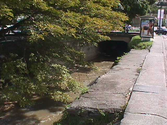 Quebrada La Guairita a nivel de la Ubanizacion La Trinidad - Municipio Baruta, Estado Miranda - Venezuela